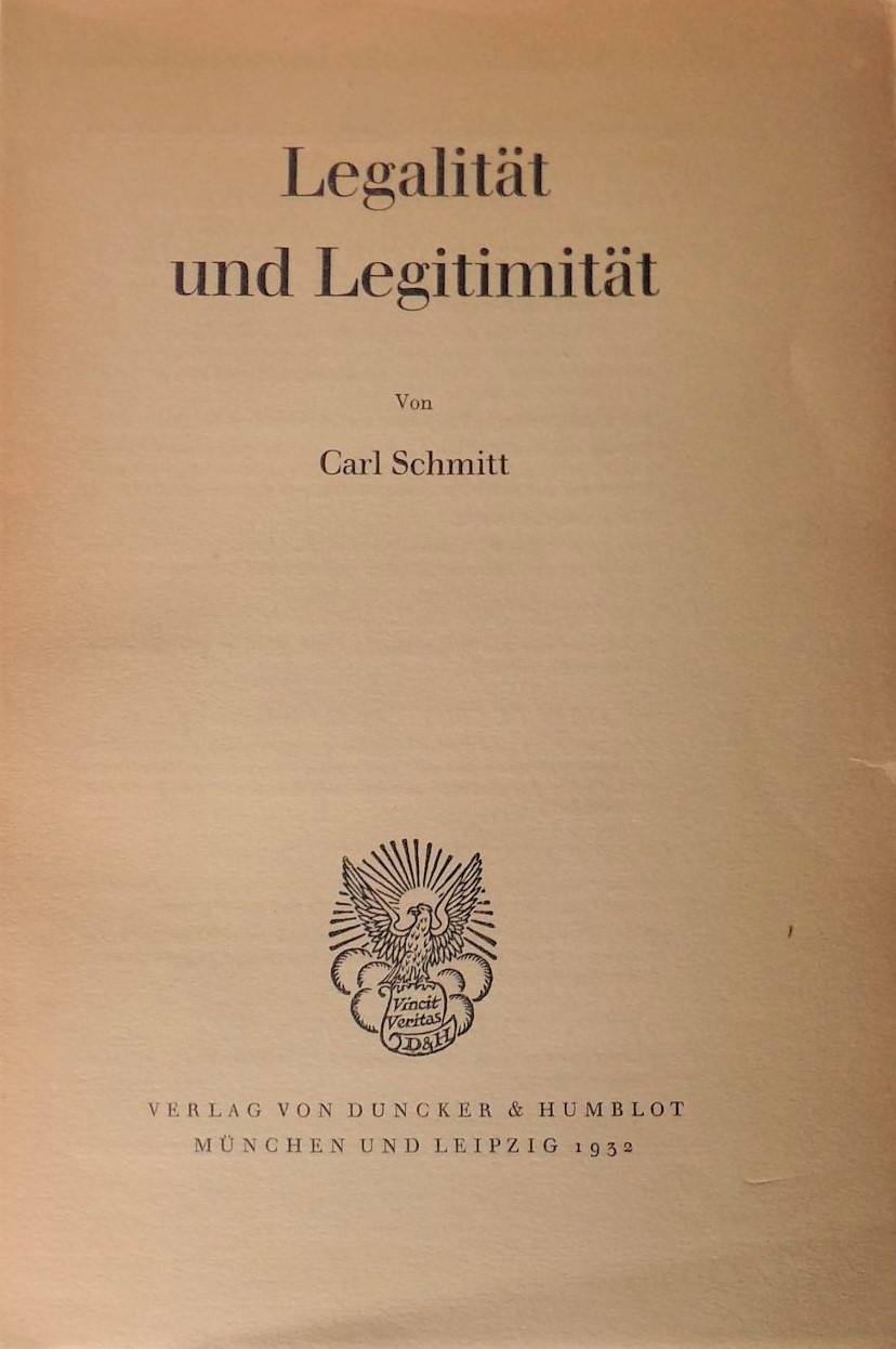 Carl Schmitt: Legalität und Legitimität, Verlag von Duncker und Humblot, München-Leipzig, 1932